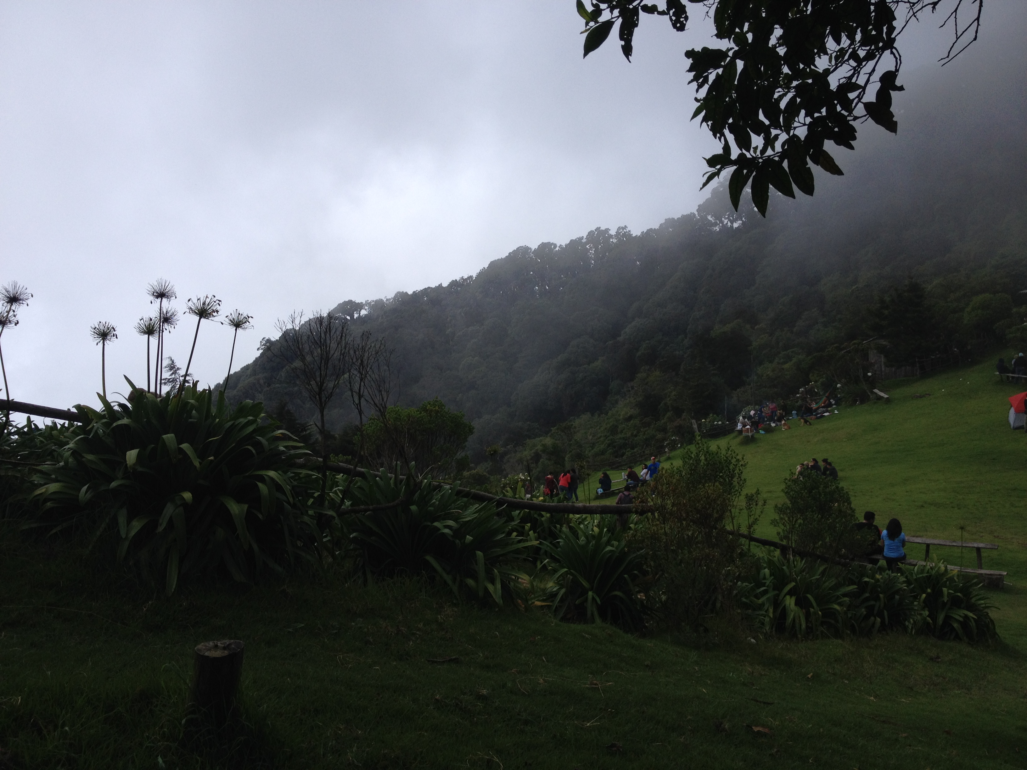 destino turistico